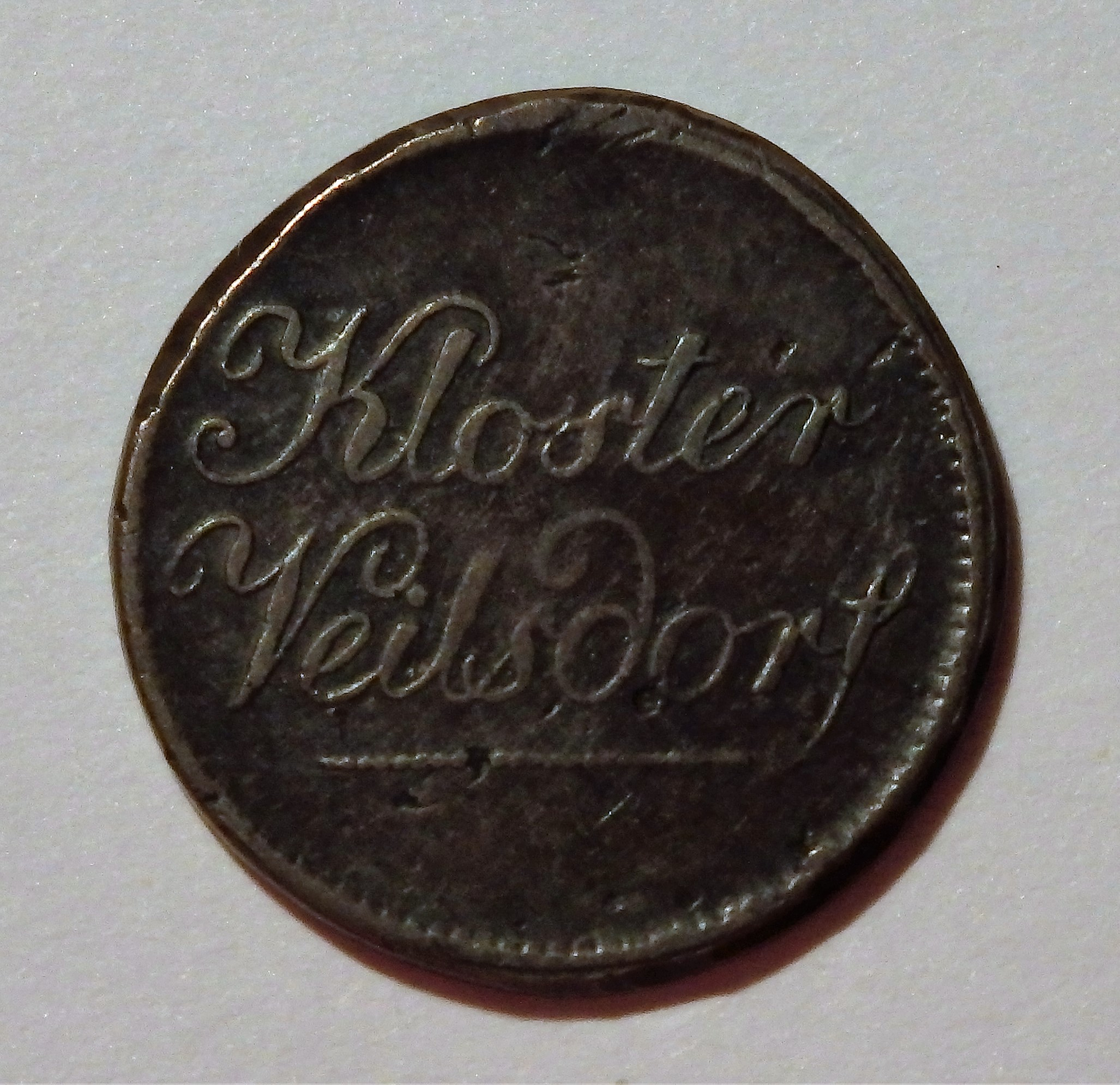 Marke der Porzellanfabrik Kloster Veilsdorf